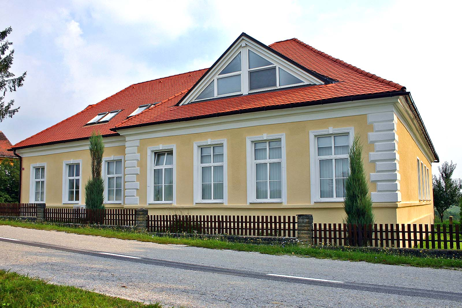 Binkoštna cerkev, Ženavlje